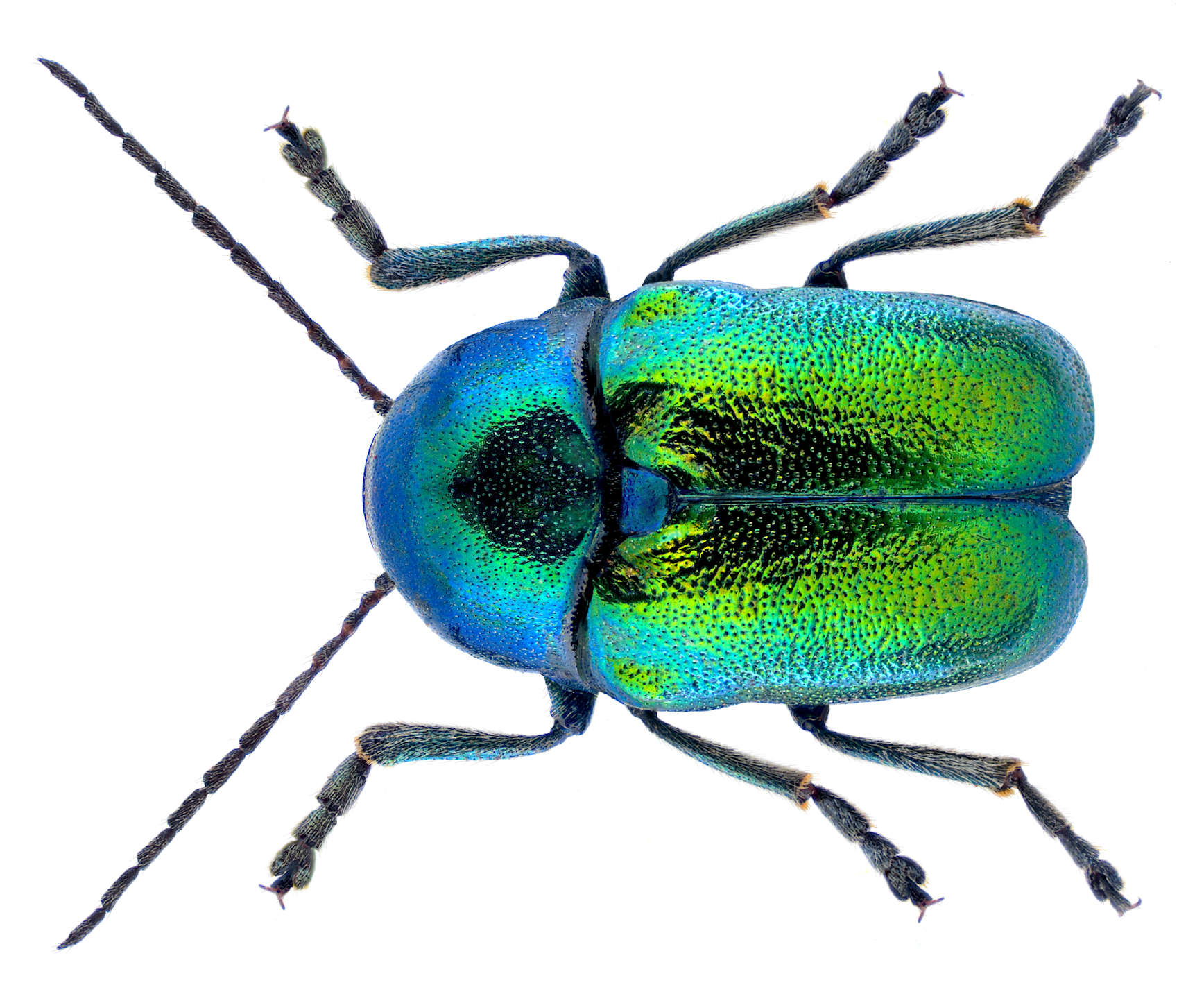 Cryptocephalus globicollis Suffrian, 1847 Familie: Chrysomelidae Groesse: 7,5 mm (6,0 bis 8,0 mm) Verbreitung: Frankreich Spanien Algerien Fundort: Frankreich, Provence, Bormes leg. H.J.Mager, 9.VI.1969; det. Steinhausen Foto: U.Schmidt, 2020